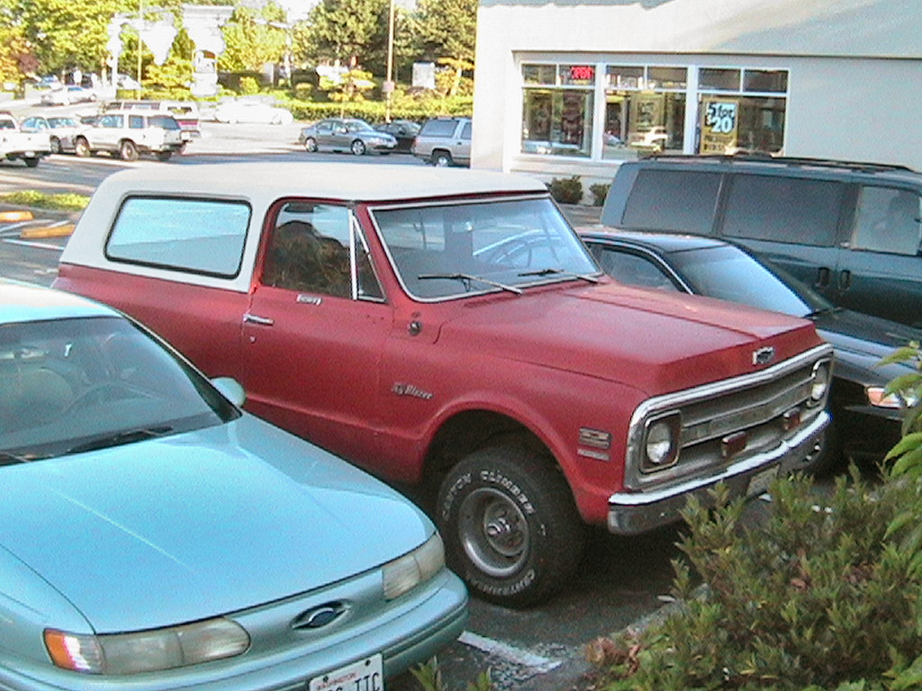 1st generation 1969 Chevrolet Blazer SUV